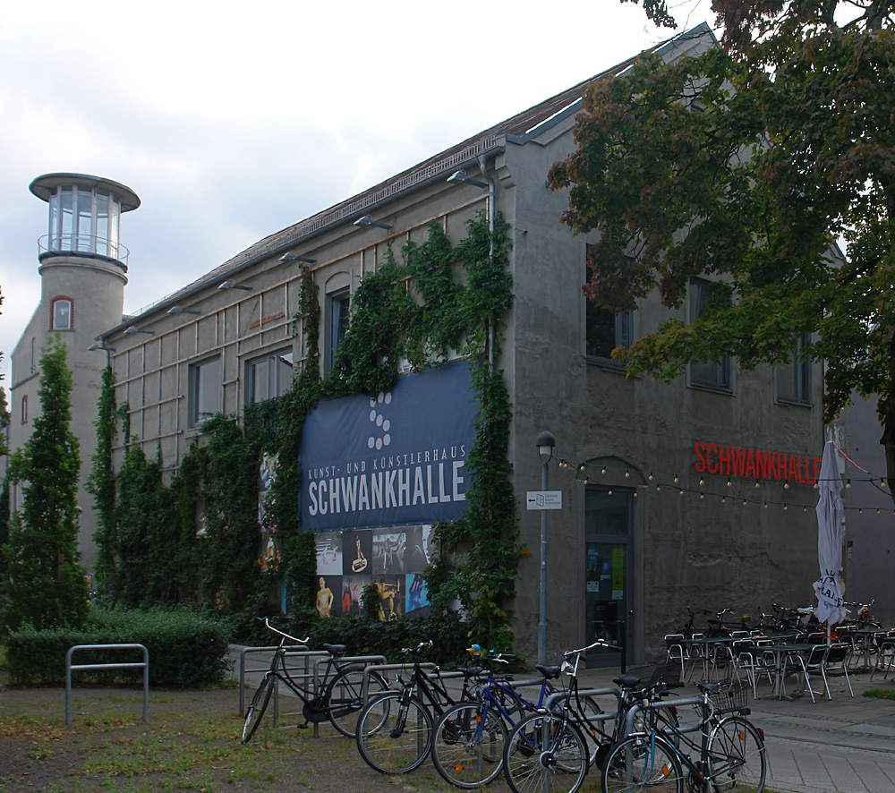 Bremen: Die Schwankhalle ist ein Veranstaltungsort und öffentliche Fördereinrichtung für Darstellende Künste der Stadt. Ehemals Remmer-Brauerei (Buntentorsteinweg 112)